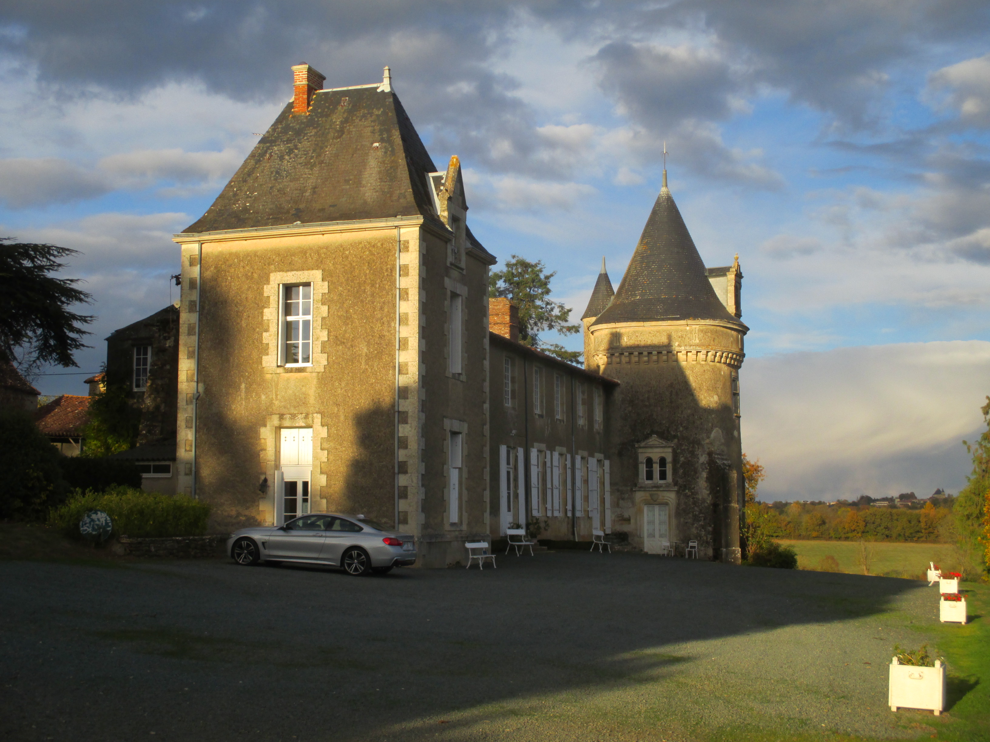 Façade principale du manoir de Ponsay